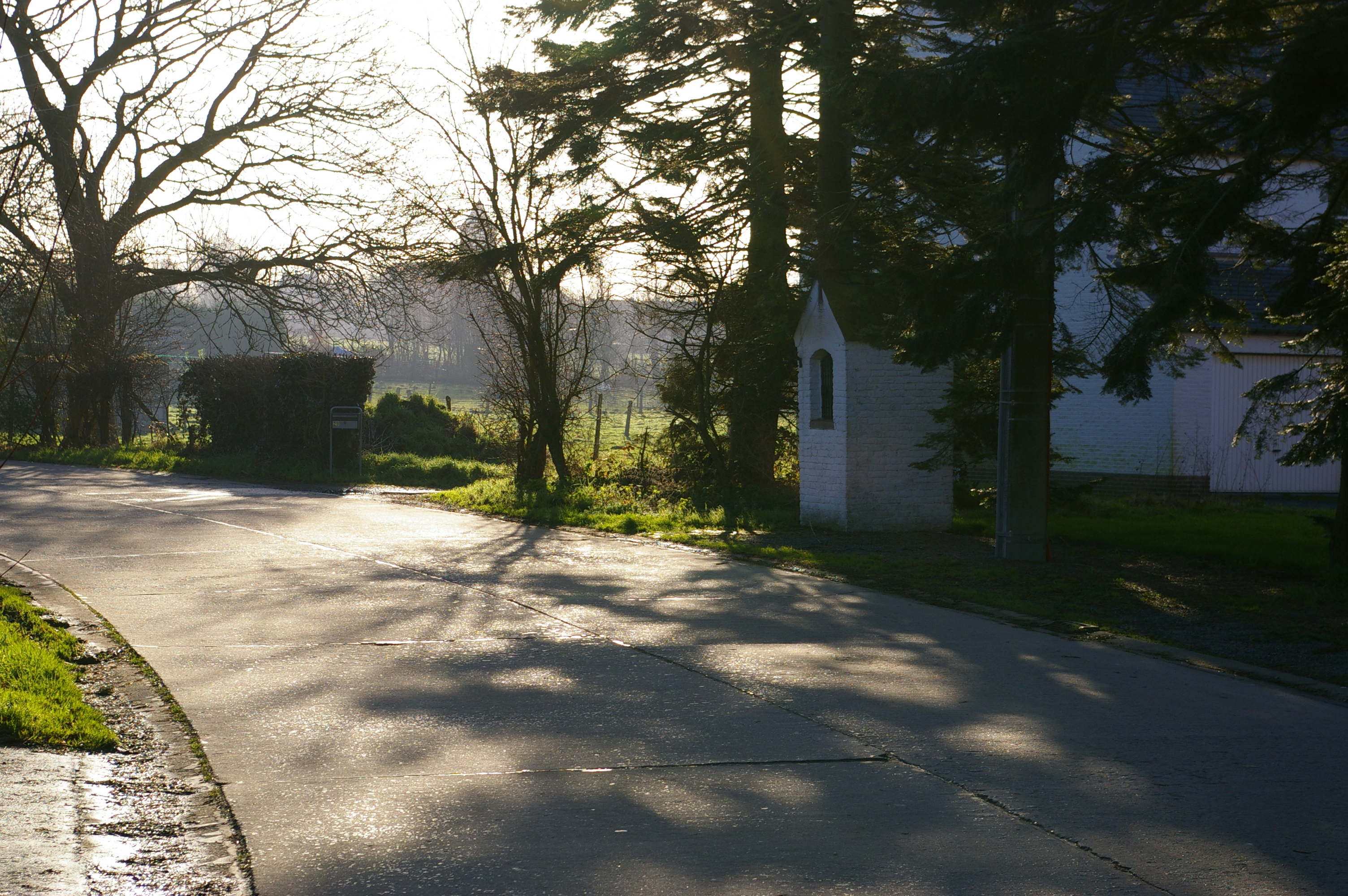 Ruez de Bétissart - Ormeignies (Ath-Belgique)